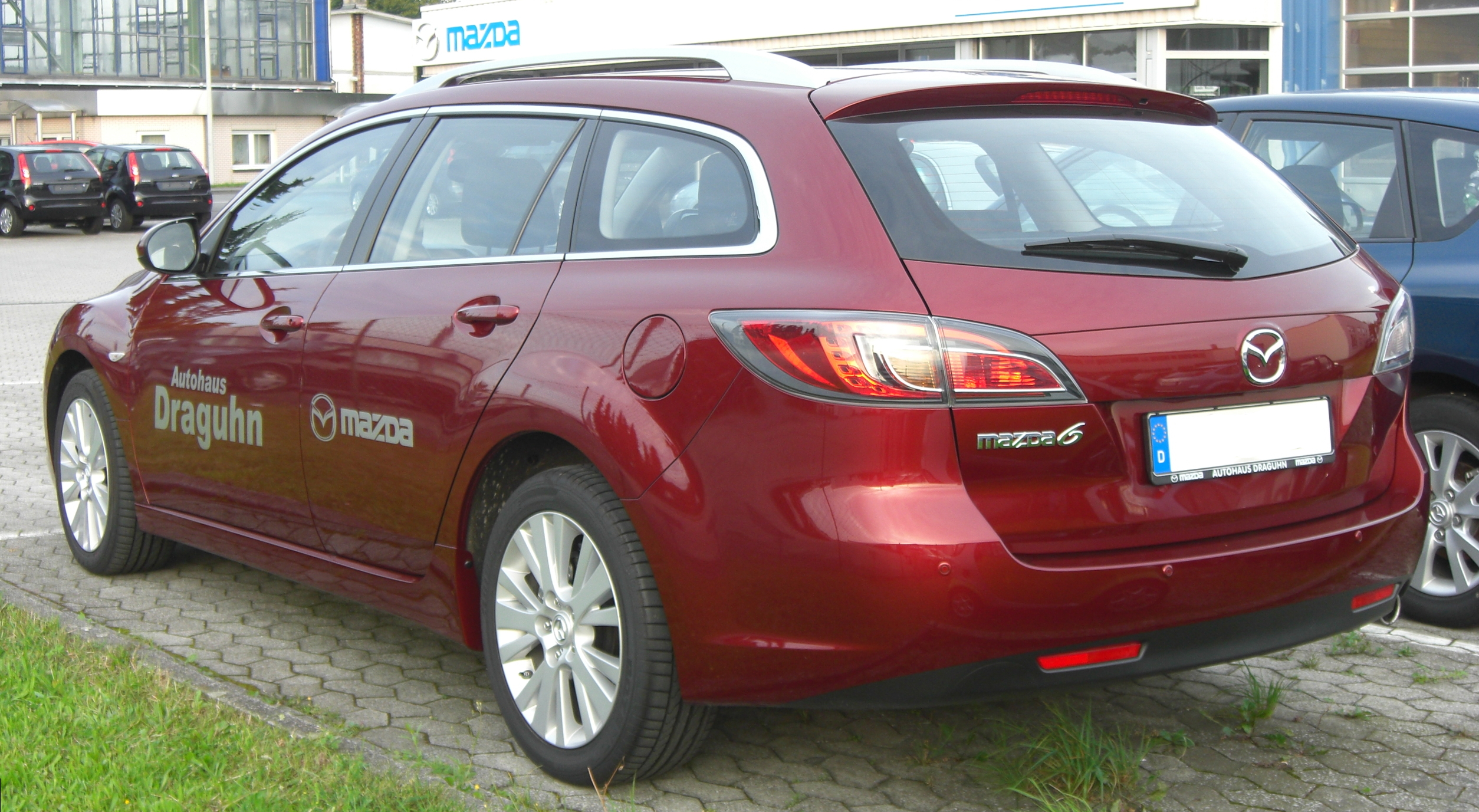 Mazda 6 Sport Kombi